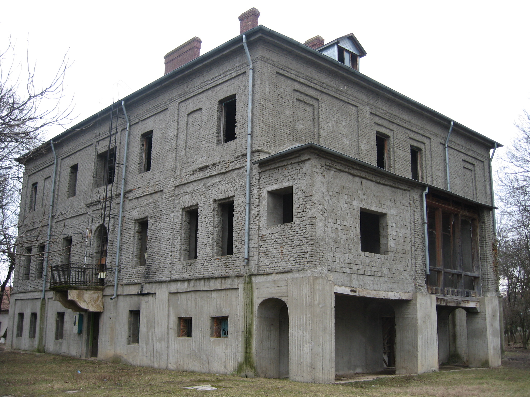 Conacul Carp din Țibănești, jud. Iași, România